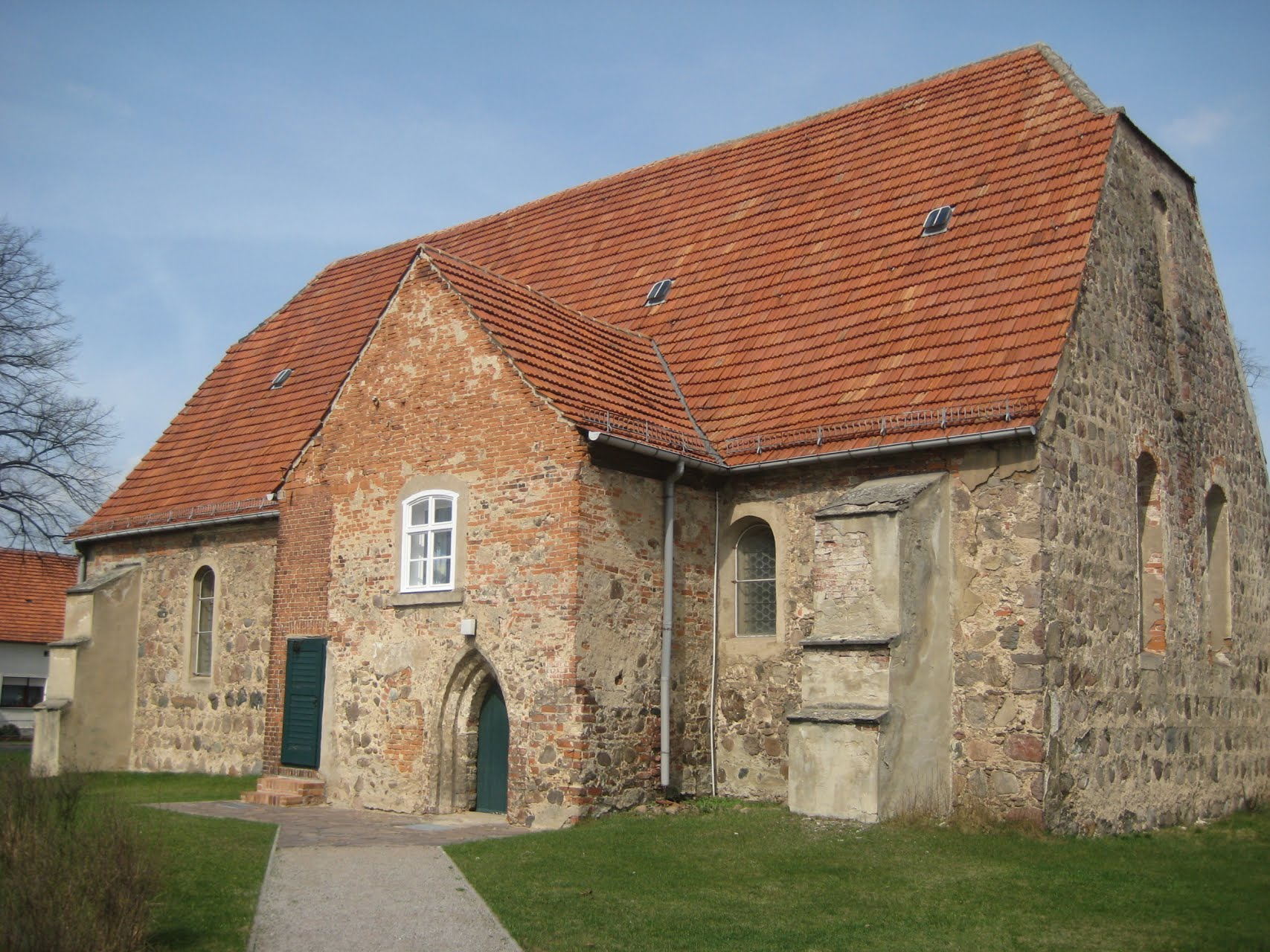 Dorfkirche in Paplitz (Baruth/Mark)